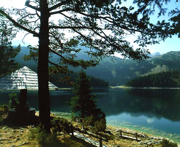 Crno jezero, Montenegro.